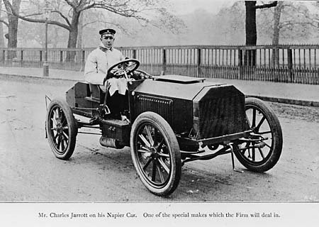 Charles Jarrott (* 1877; † 1944) auf seinem Napier-Rennwagen (4 Zylinder, 7,7 Liter Hubraum; Foto um 1903). Dies scheint der Napier-Teamwagen zu sein, mit dem Jarrott am Gordon-Bennett-Rennen 1903 teilnahm und nach einem Unfall ausfiel. Das Fahrzeug wurde danach neu aufgebaut und besteht noch.